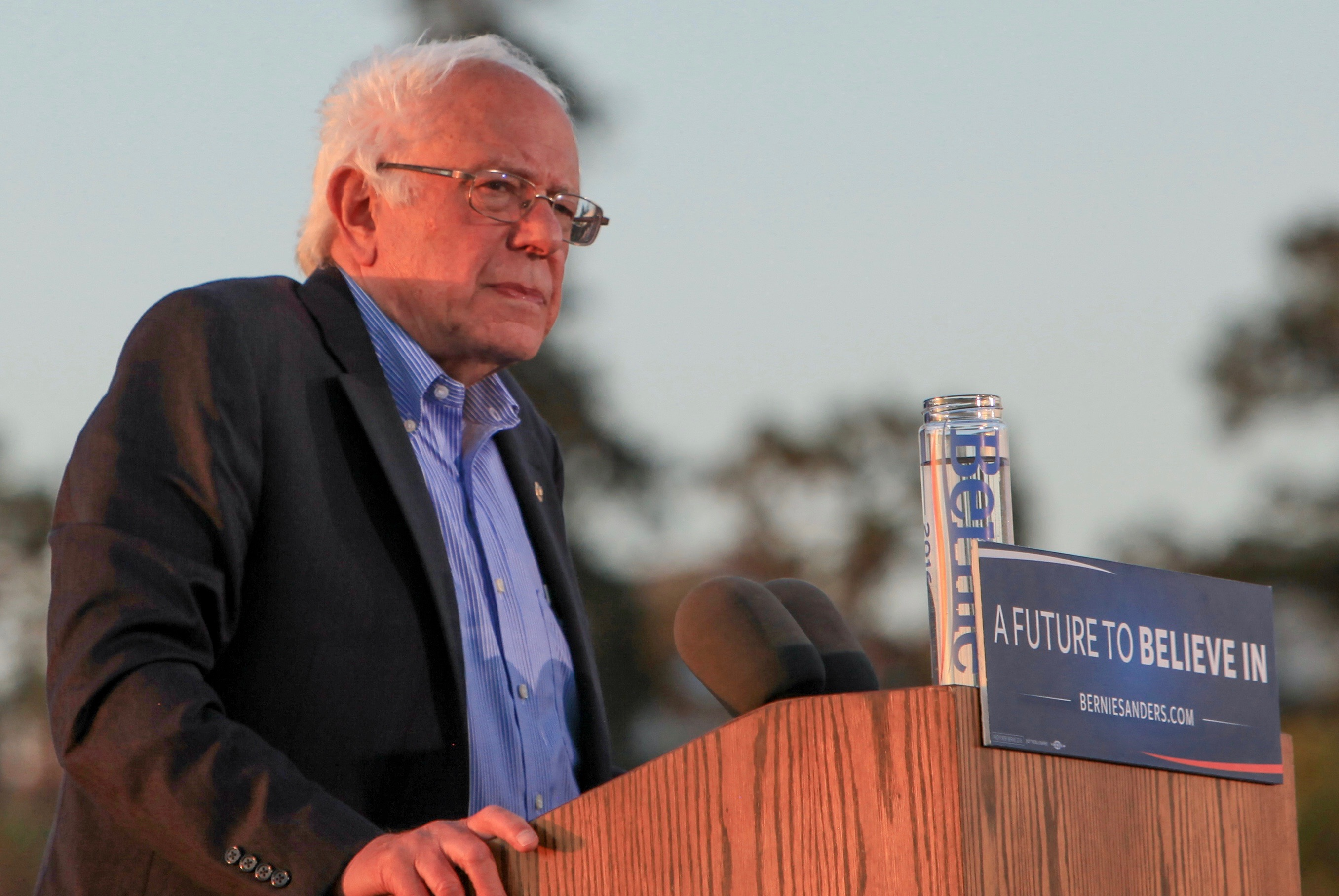 Bernie Sanders, Vallejo CA Rally